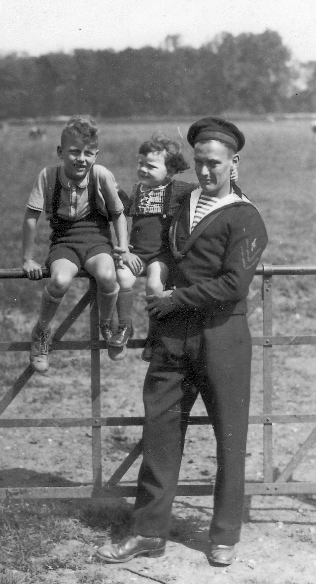 Sjoerd Wilhelm Soeters met neefje en nichtje in Zutphen